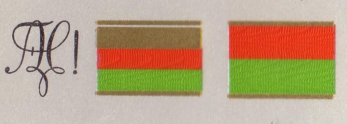 Zirkel, Corpsburschenband und Fuchsenband der Alamannia Basel